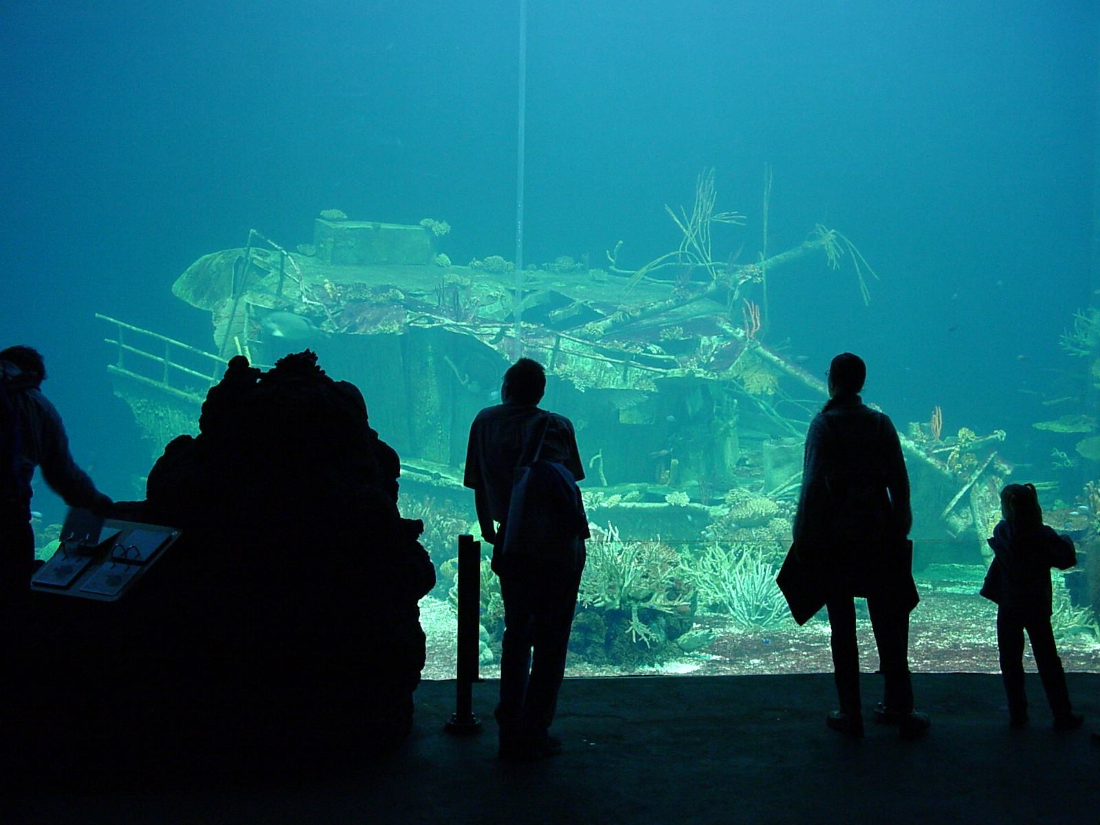 Arnhem, Burgers Zoo